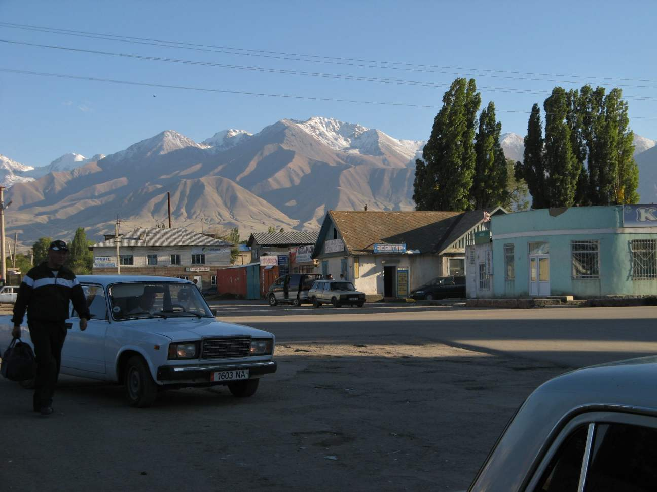 centro di Kočkor (provincia di Naryn)